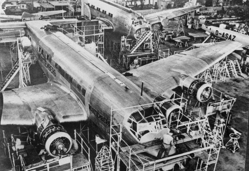 In den Dessauer-Junkers-Werken entsteht das grösste deutsche viermotorige Grossraum-Schnellverkehrs-Flugzeug für 40 Fluggäste. Fluggewicht-23 Tonnen. Reisegeschwindigkeit-rund 350 Std. -km. Bild zeigt Blick in eine der grossen Montagehallen, in der zwei Grossraum- Schnellverkehrs-Flugzeuge Junkers Ju 90 ihrer Fertigstellung entgegengehen.